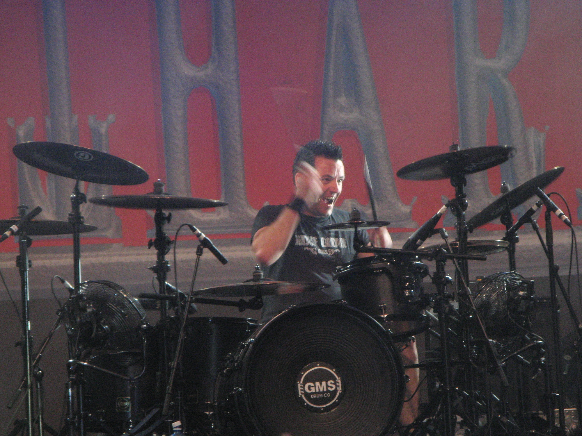 Hena Habegger, Schlagzeuger von Gotthard. Aufgenommen am Radio Argovia Fäscht 2010 beim Flugplatz Birrfeld in Lupfig.